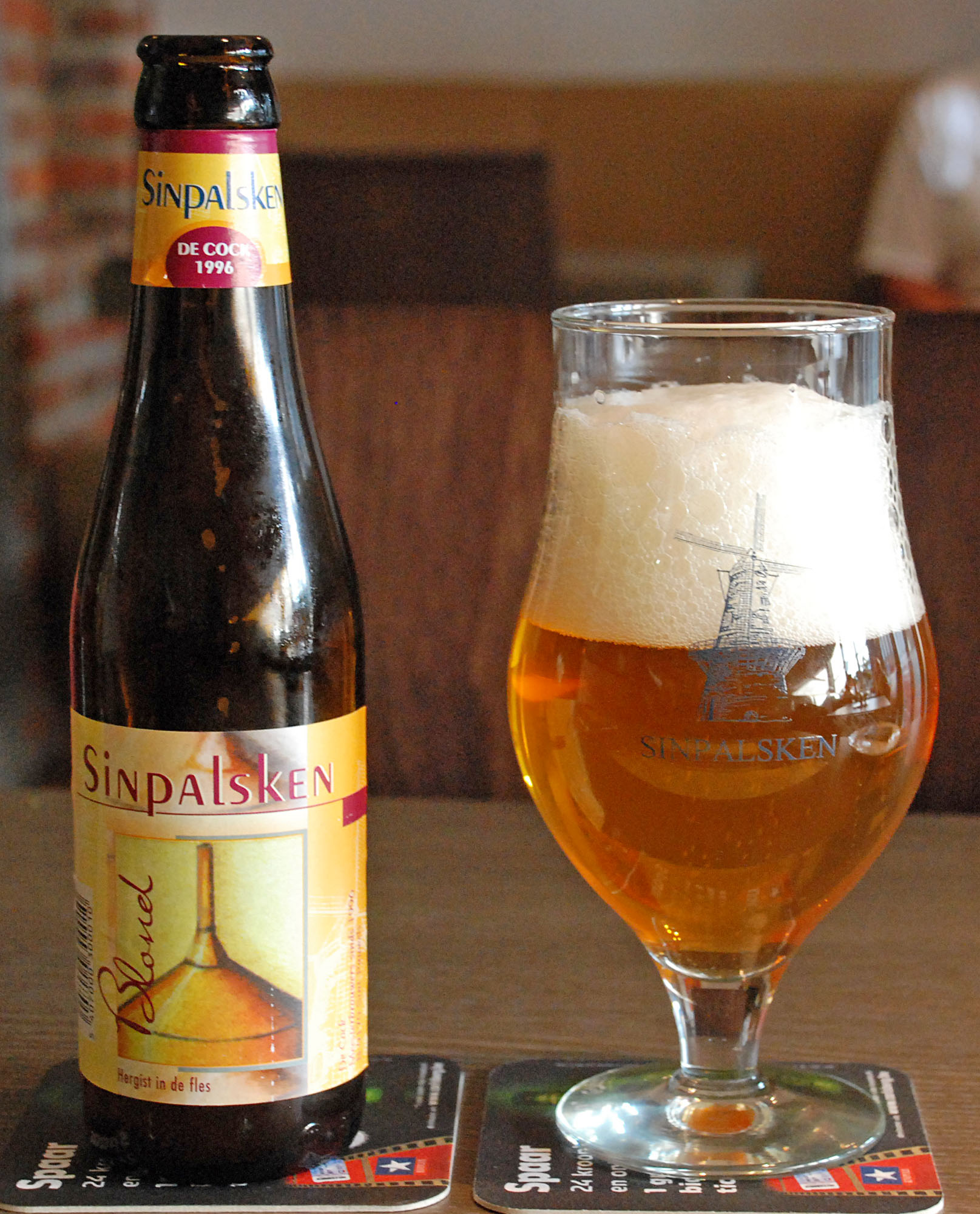 Sinpalsken Blond